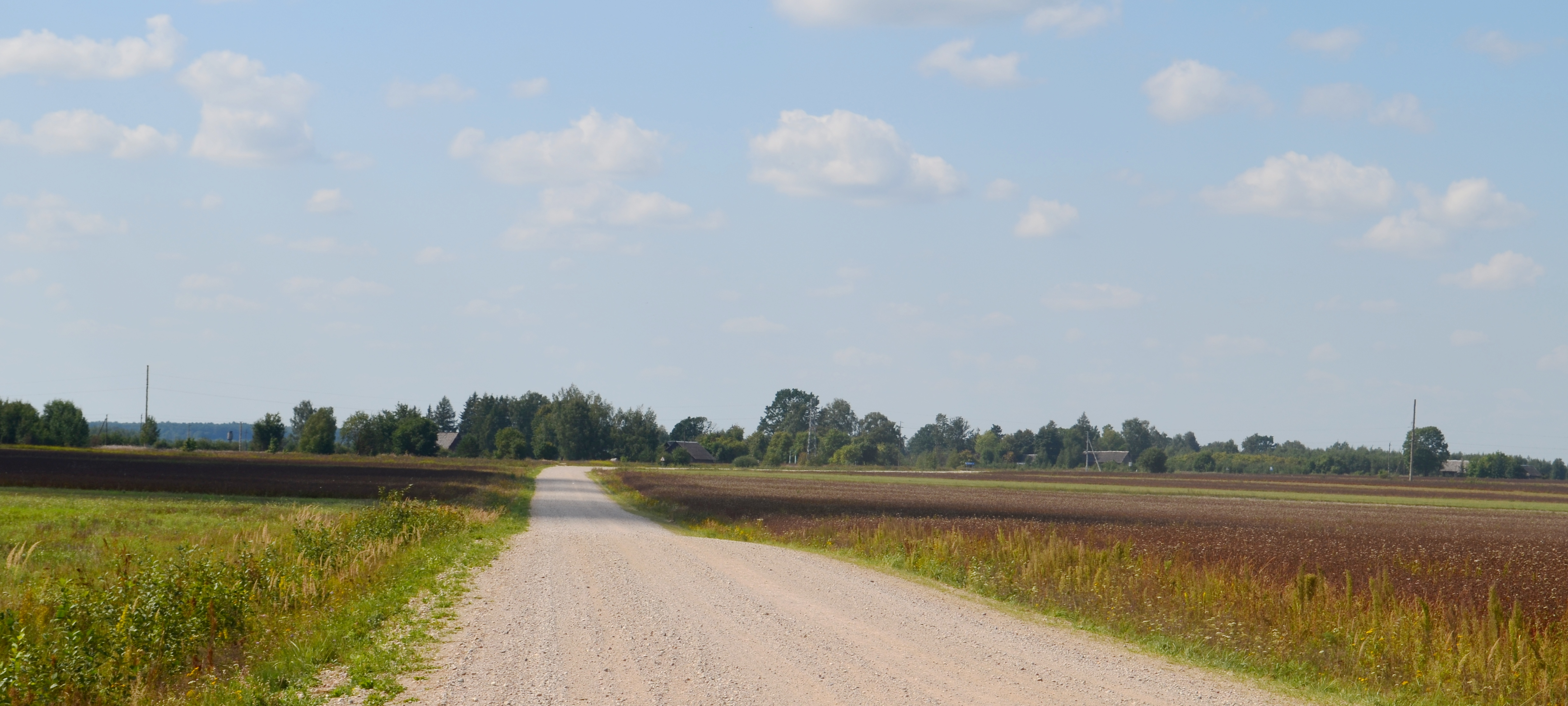 Krakūnai, Šalčininkų raj.